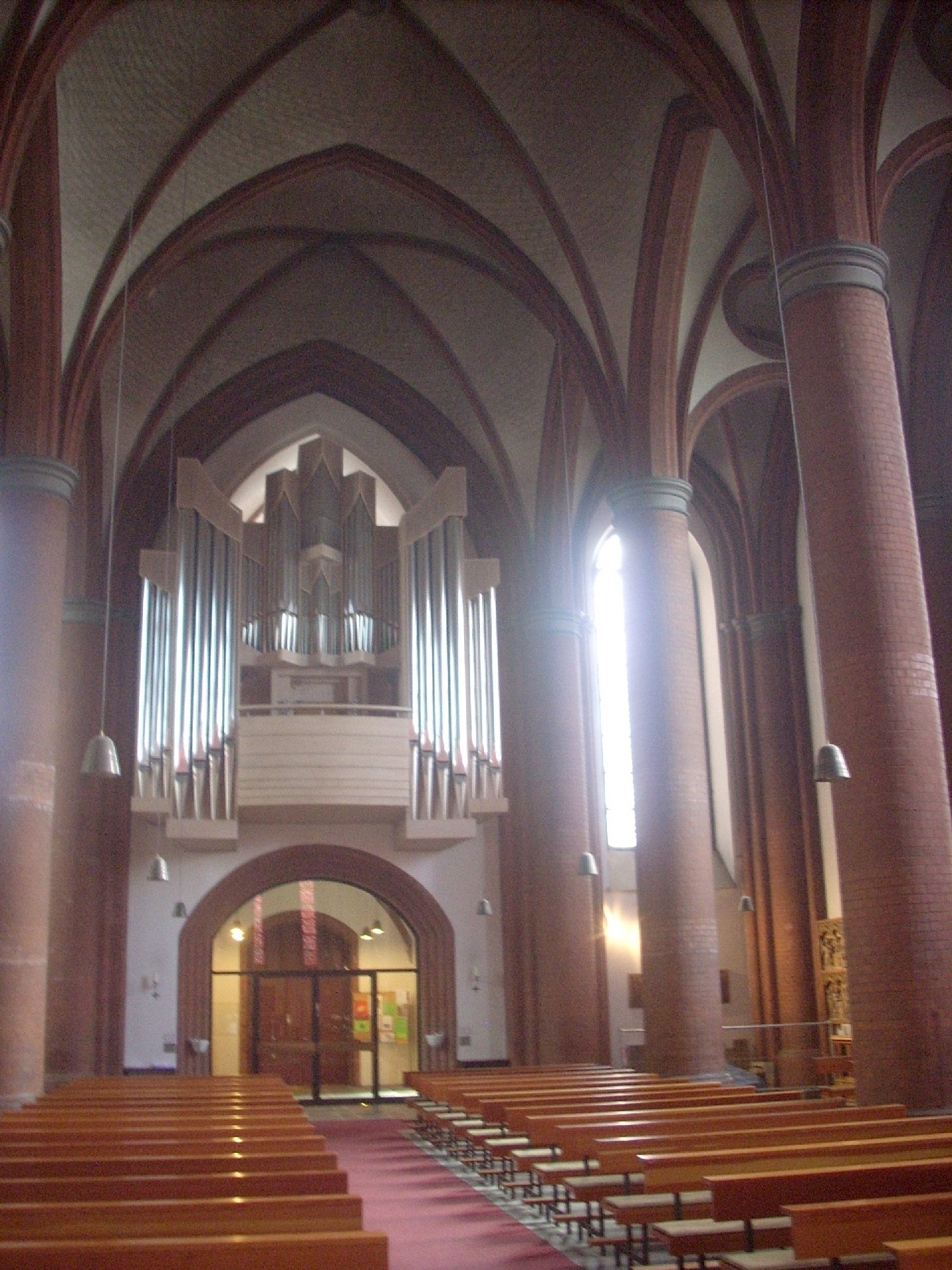 Lübeck, Kath. Propsteikirche Herz Jesu, Orgel